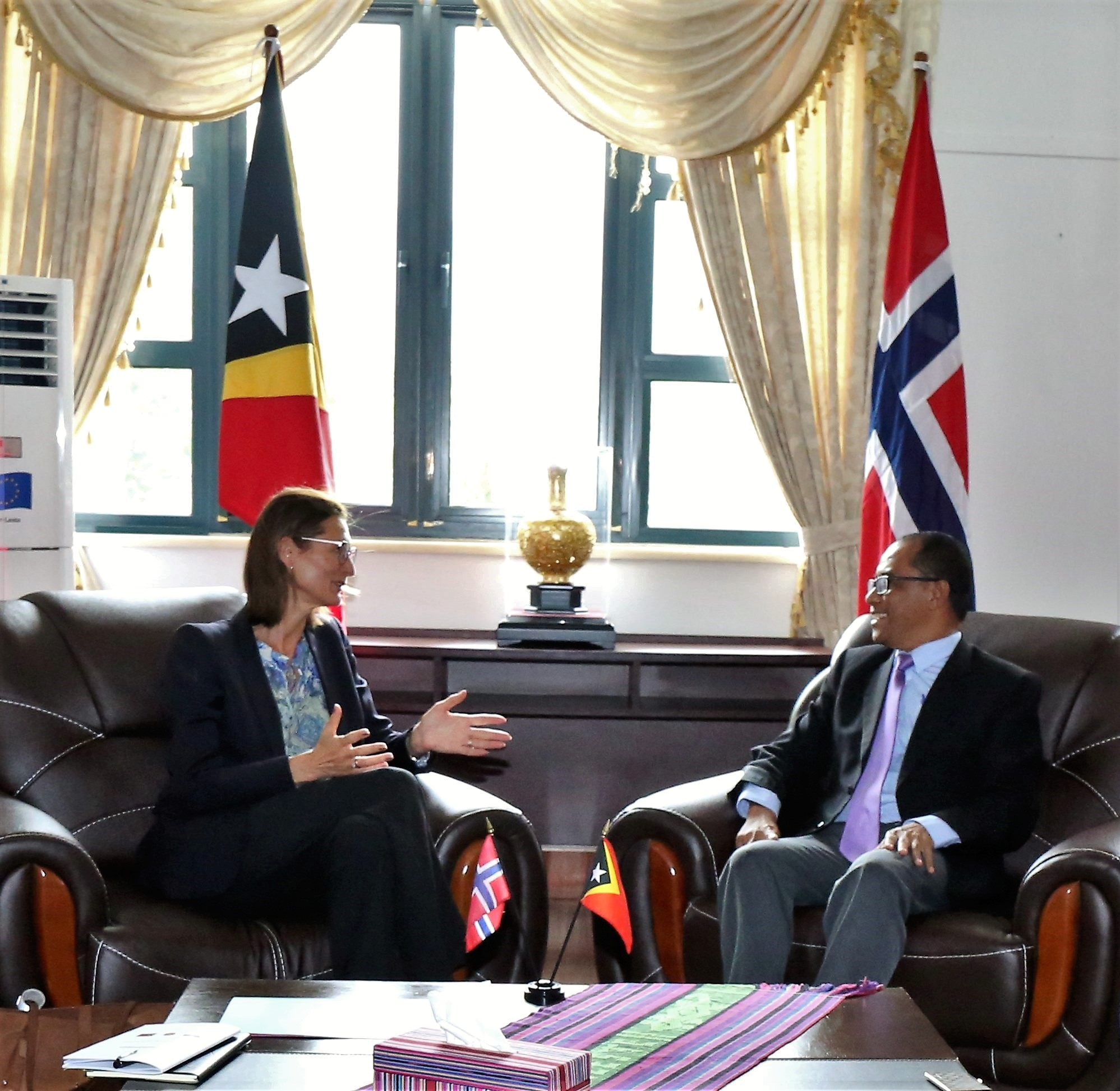 Norwegens Vize-Außenminister Marianne Hagen und Osttimors Außenminister Dionísio Babo Soares in Dili